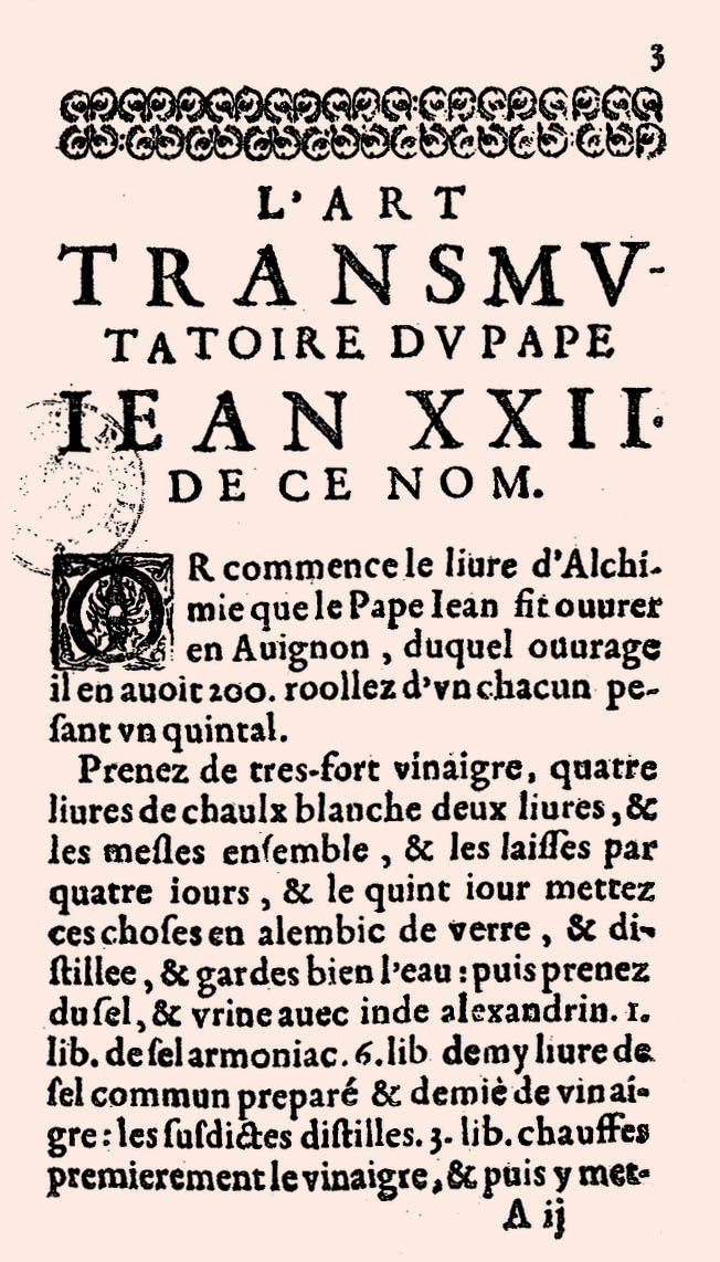 Première page de l'Art transmutatoire de Jean XXII